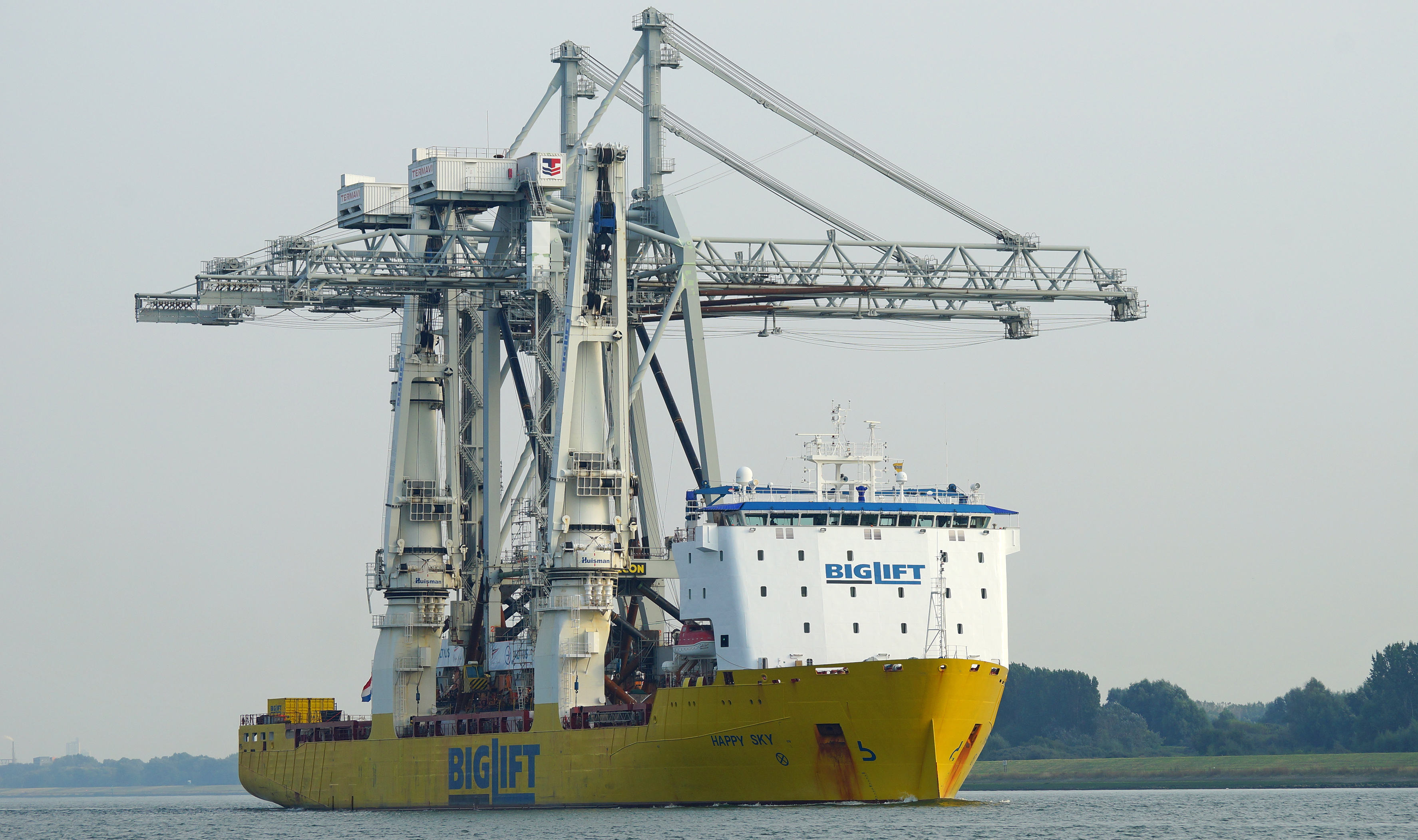 De kranen hebben tot vorig jaar dienst gedaan op de toenmalige Home terminal van containeroverslagbedrijf ECT. De kranen zijn bijna 60 meter hoog, zo’n 27 meter breed en 15,25 m lang. Tijdens het transport steken ze in totaal 62 meter uit – 39 meter aan bakboord, 23 meter aan stuurboord. Per stuk wegen de kranen ruim 800 ton